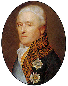 Mr. Adriaan Pieter Twent van Raaphorst (1745 - 1816), portret op koper, Rijksmuseum Amterdam. Dignitary in the Order of the Two Sicilies (1808)